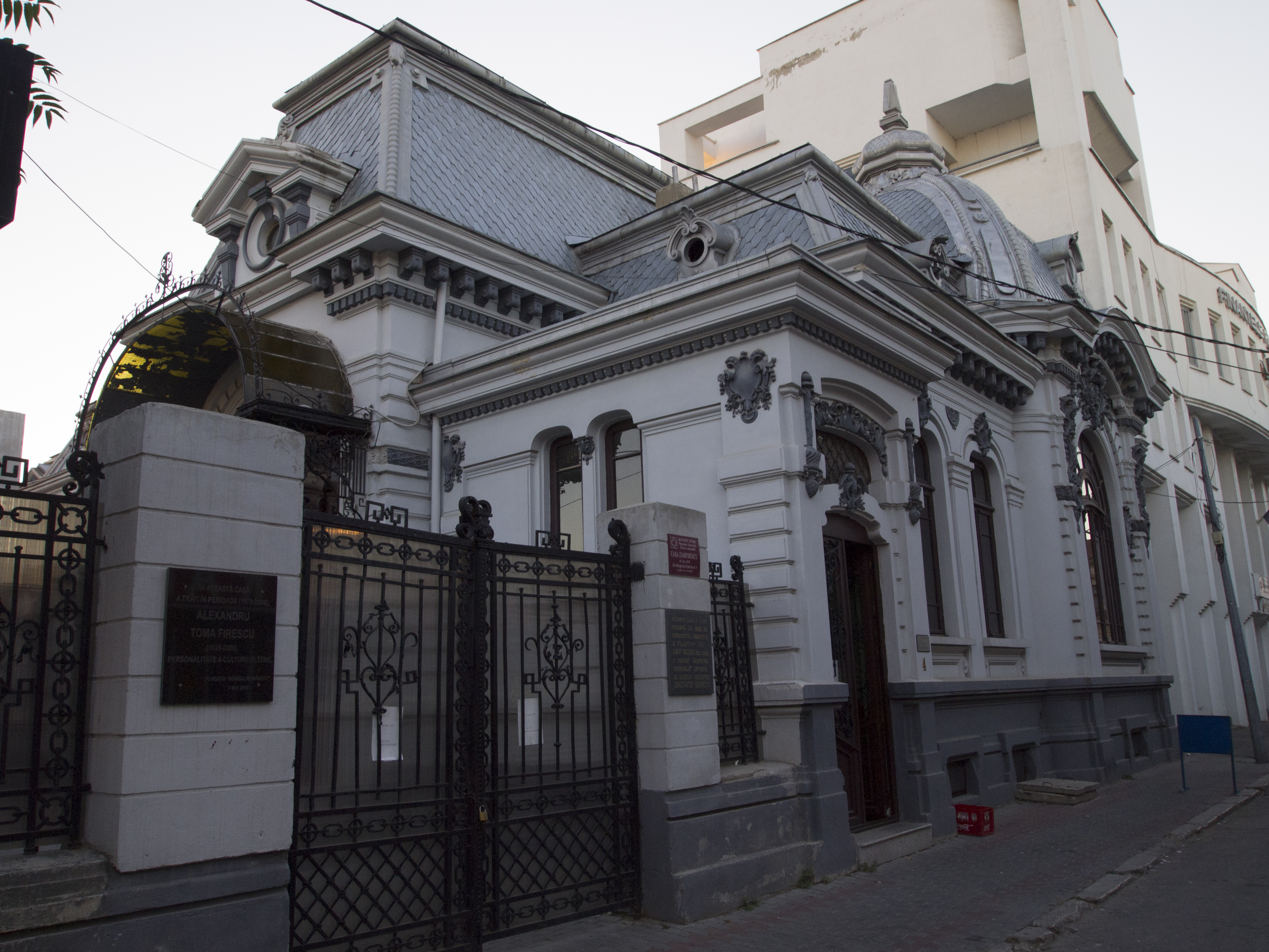 Casa Zamfirescu